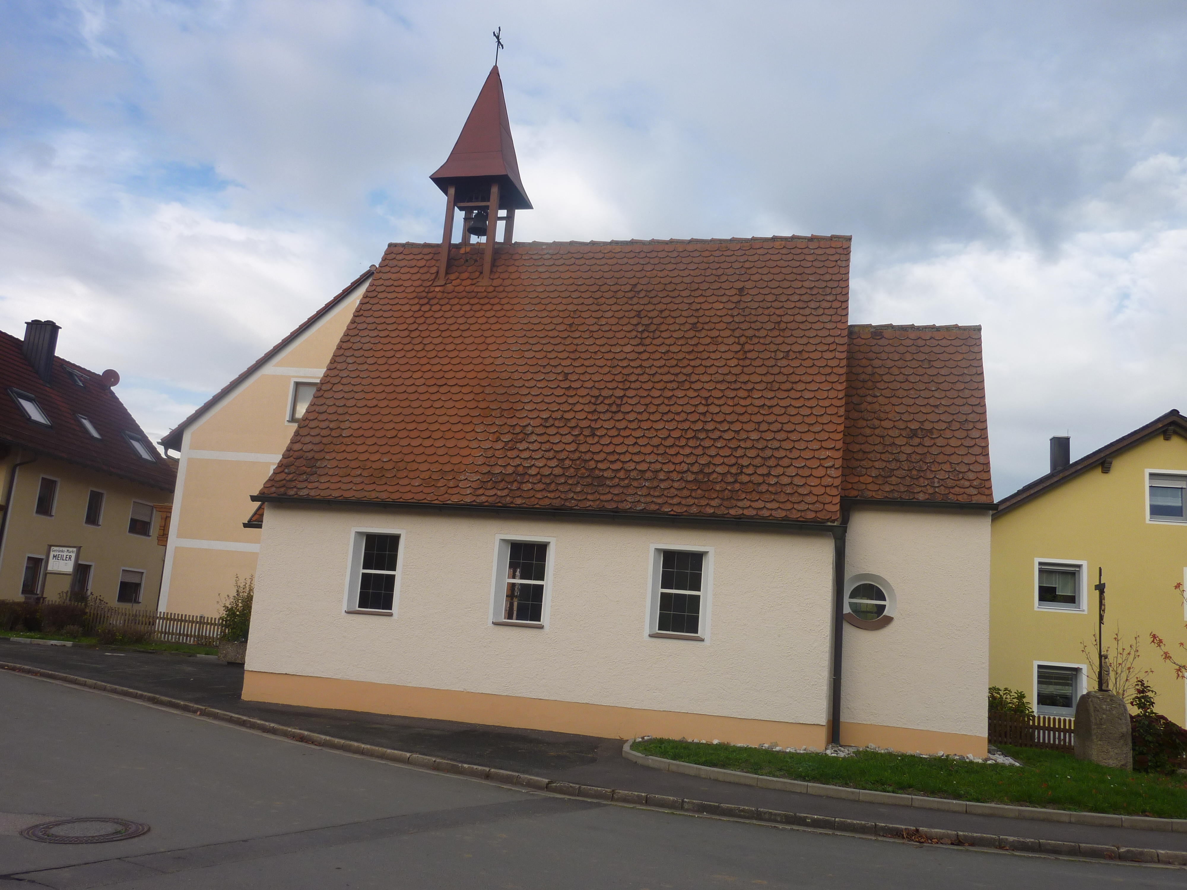 Kapelle Hiltersdorf